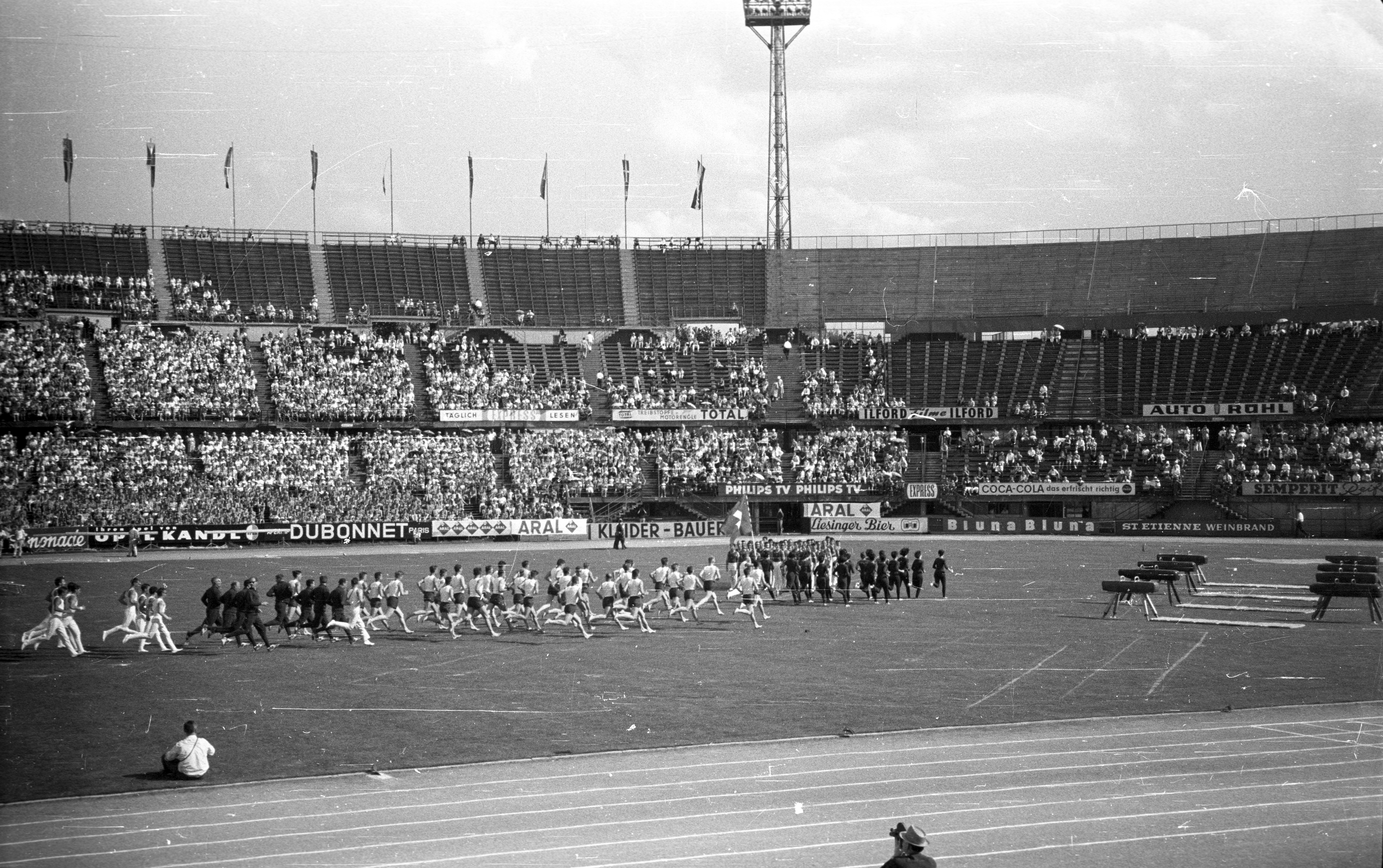 Práter (ma Ernst Happel) stadion. A IV. World Gymnaestrada megnyitója 1965. július 20-án. Location: Austria, Vienna Tags: stadium, mass games Title: Práter (ma Ernst Happel) stadion. A IV. World Gymnaestrada megnyitója 1965. július 20-án.